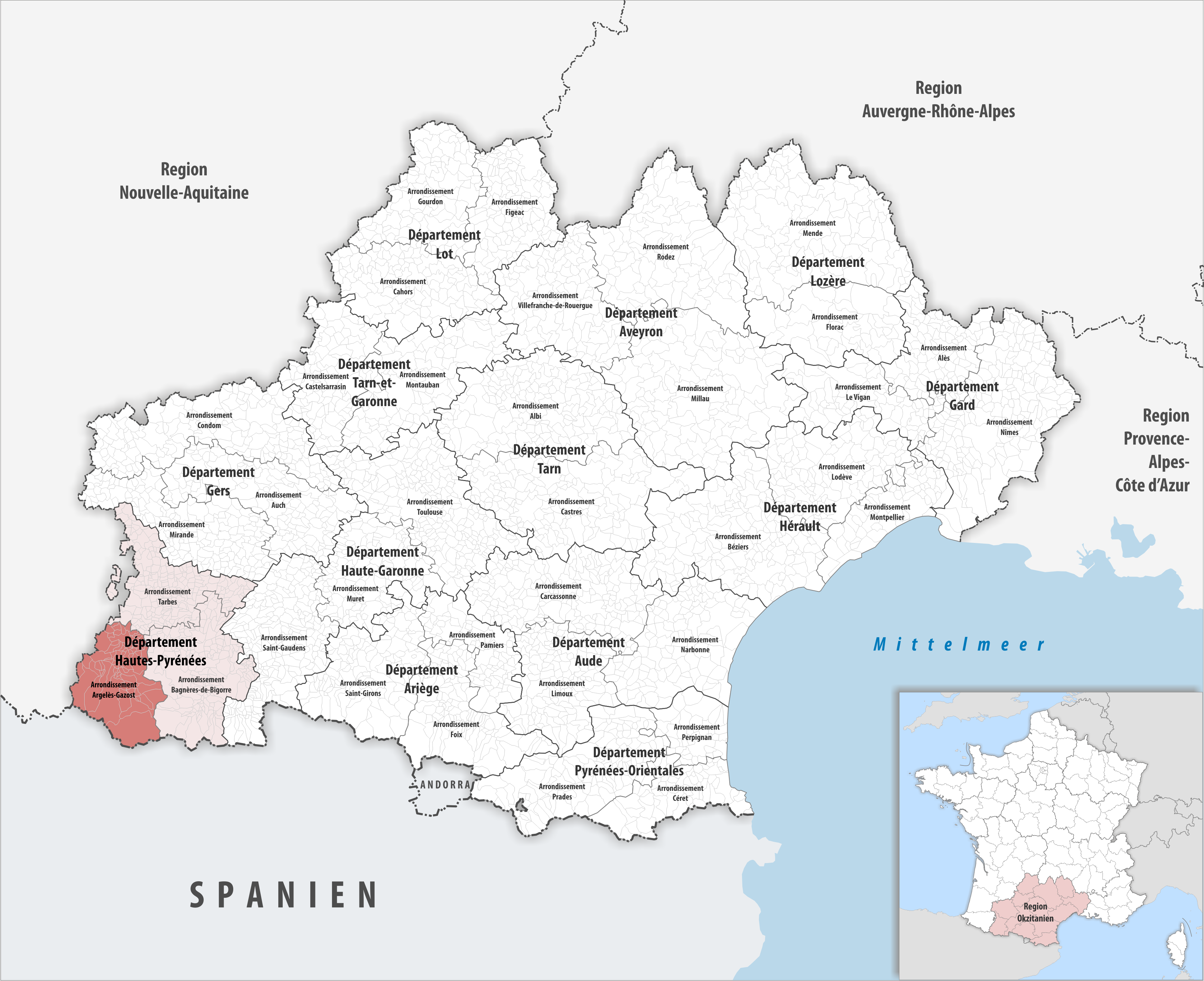 Lage des Arrondissements Argelès-Gazost